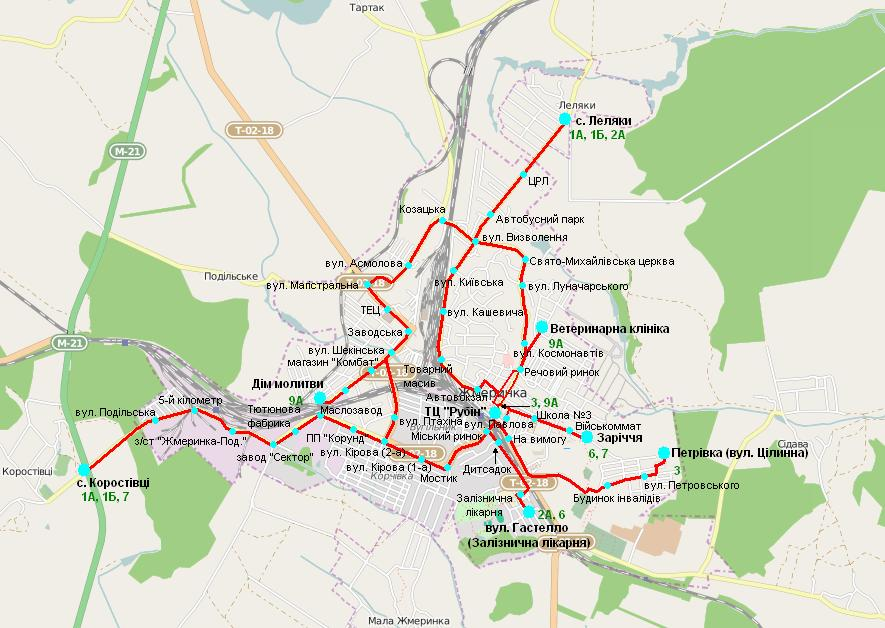 Жмеринкабус: схема руху маршрутів жмеринського автобуса This map may be incomplete, and may contain errors. Don't rely solely on it for navigation.